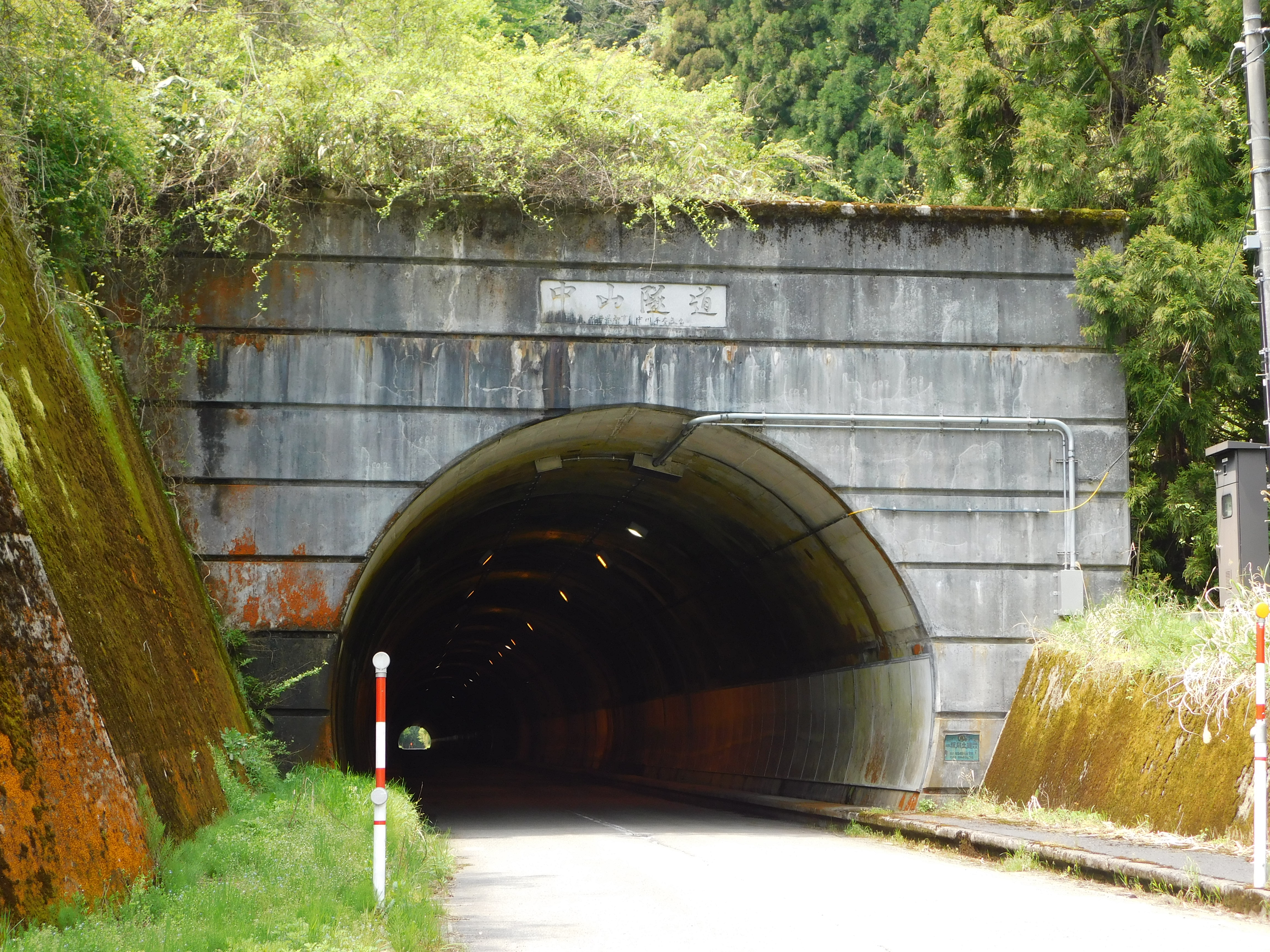 福井県道206号にある中山トンネル、越前市側入口。